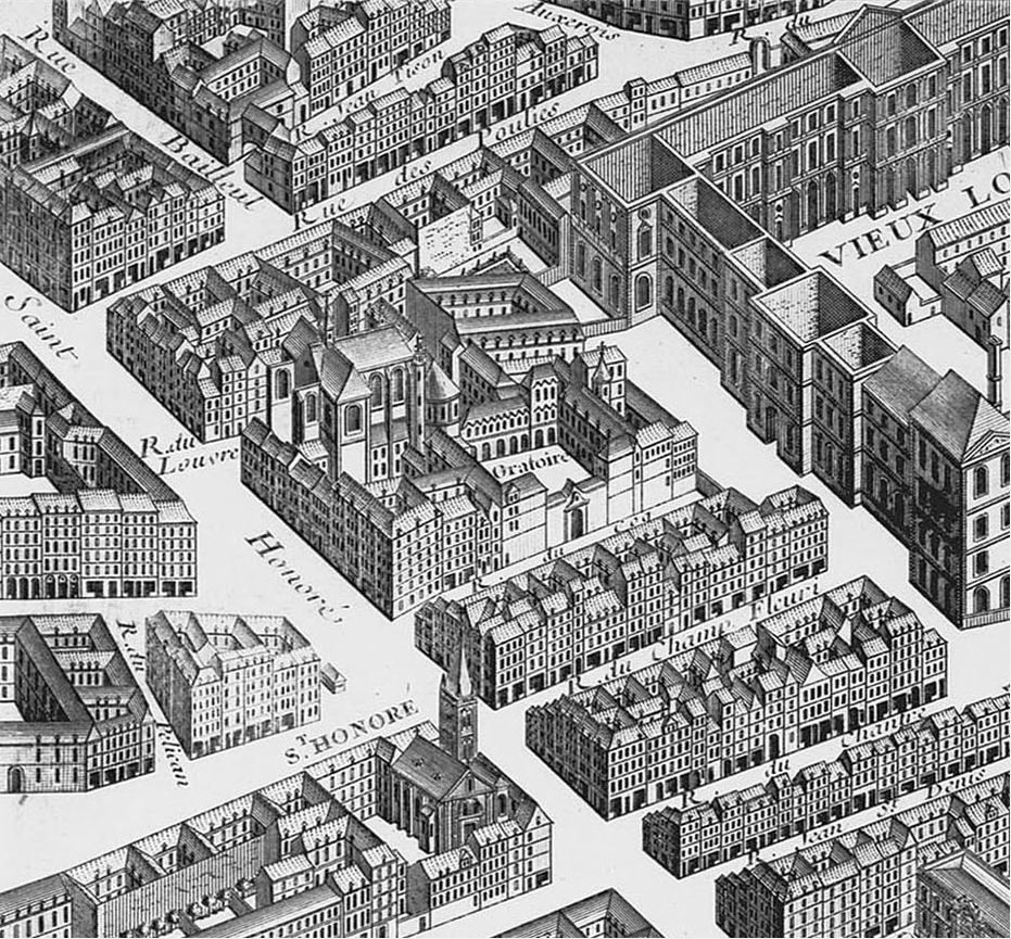 Environnement Temple protestant libéral de l'Oratoire du Louvre, plan Turgot 1739